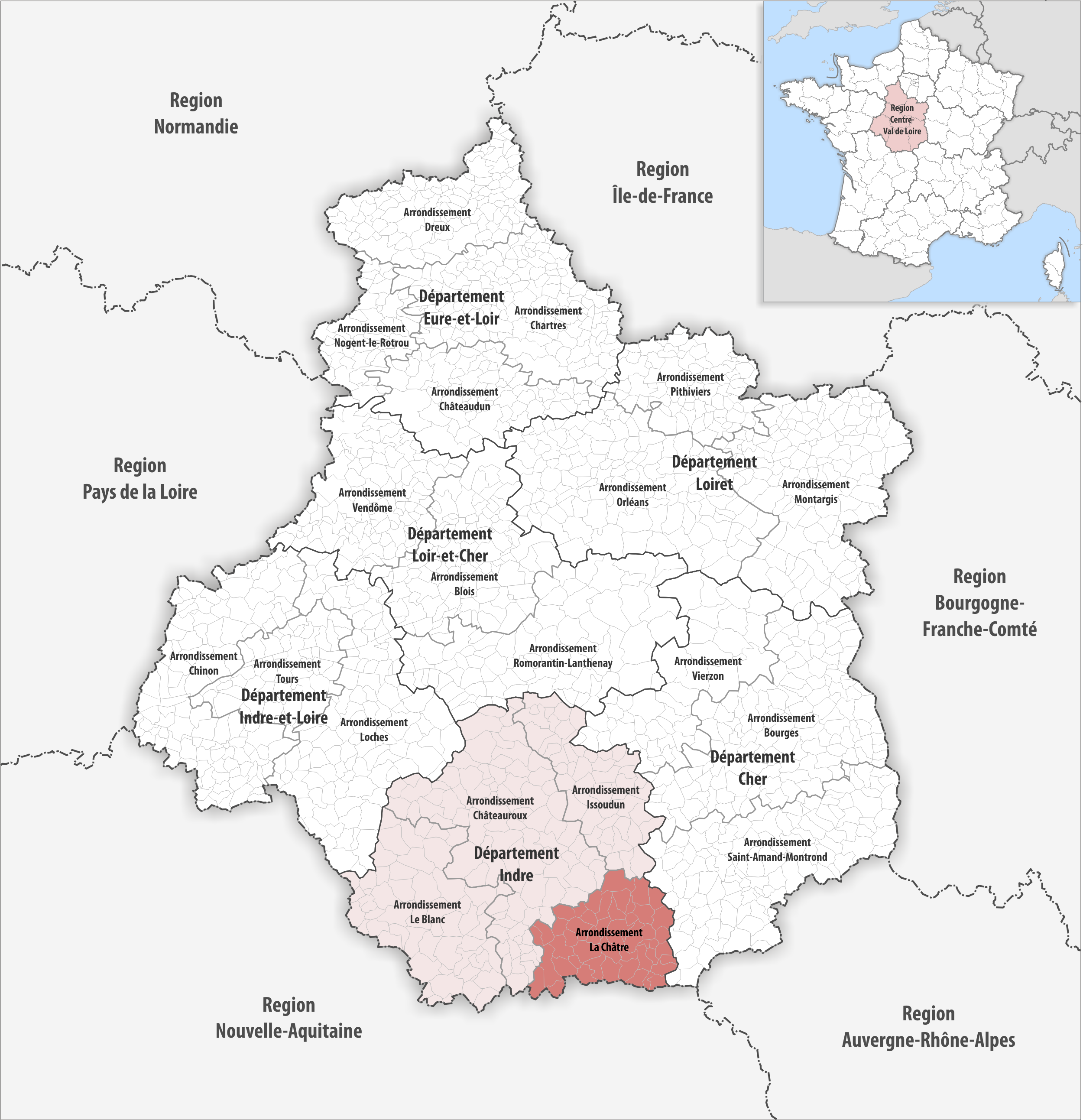 Lage des Arrondissements La Châtre